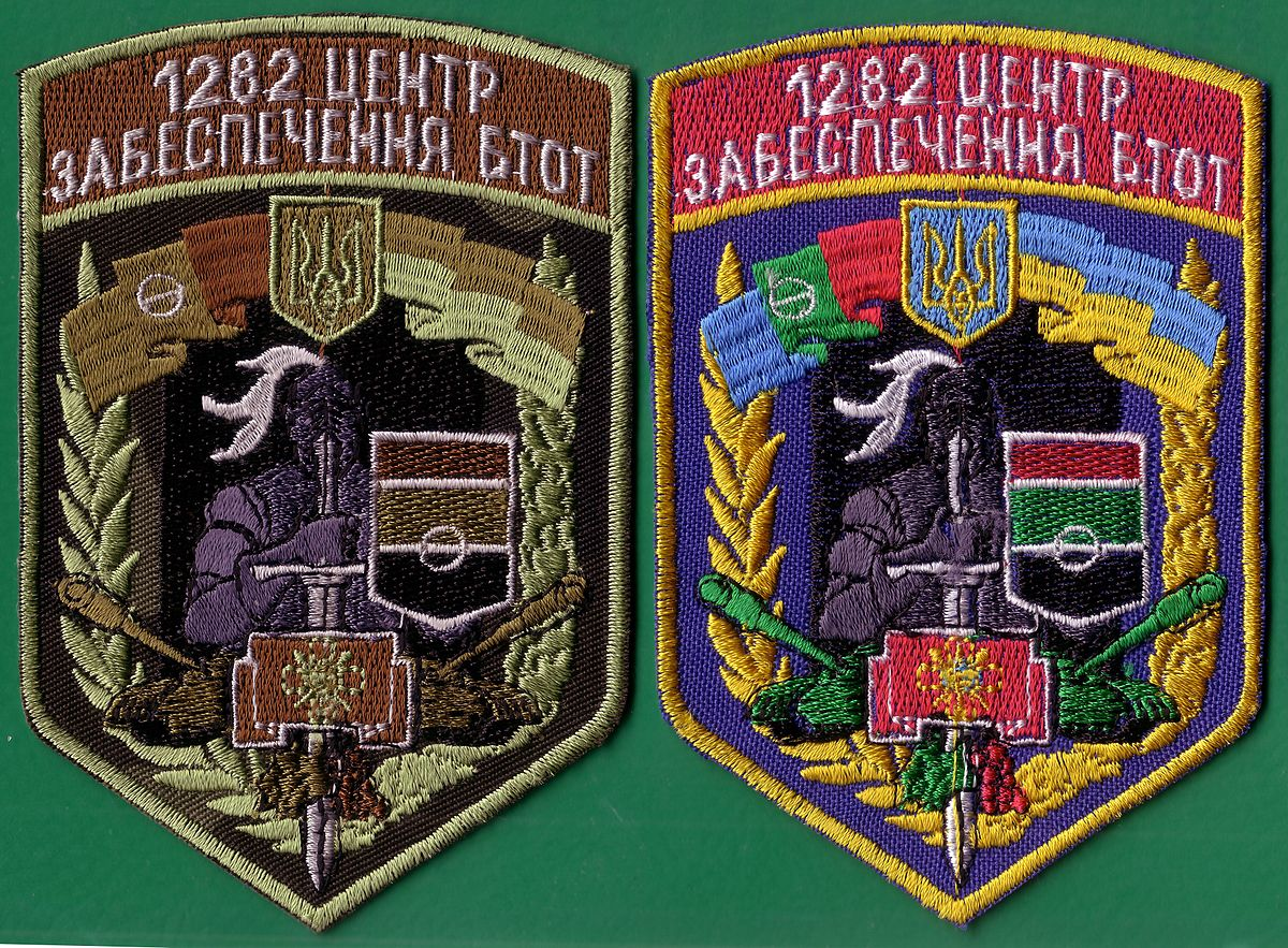 Емблема 1282 Центру БТОТ (Бази технічного обслуговування танків) Міністерства оборони України. Артемівськ. Нарукавний шеврон: зліва на польову, праворуч на парадну форму. Поділу на малий і великий шеврони немає. Носиться на правій руці. На лівій повинен бути загальновійськовий. Зображено герб Артемівська.